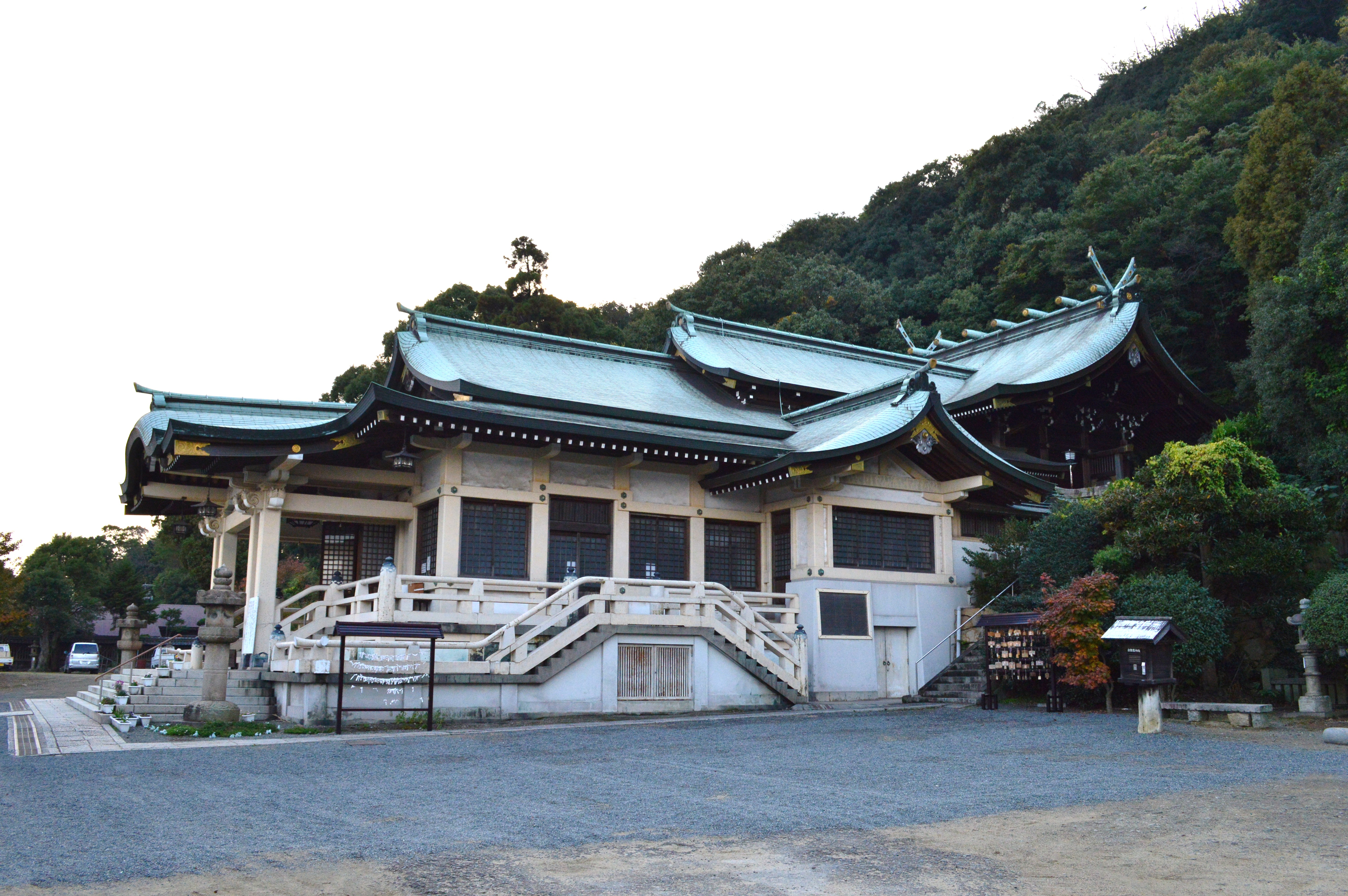 沼名前神社 社殿